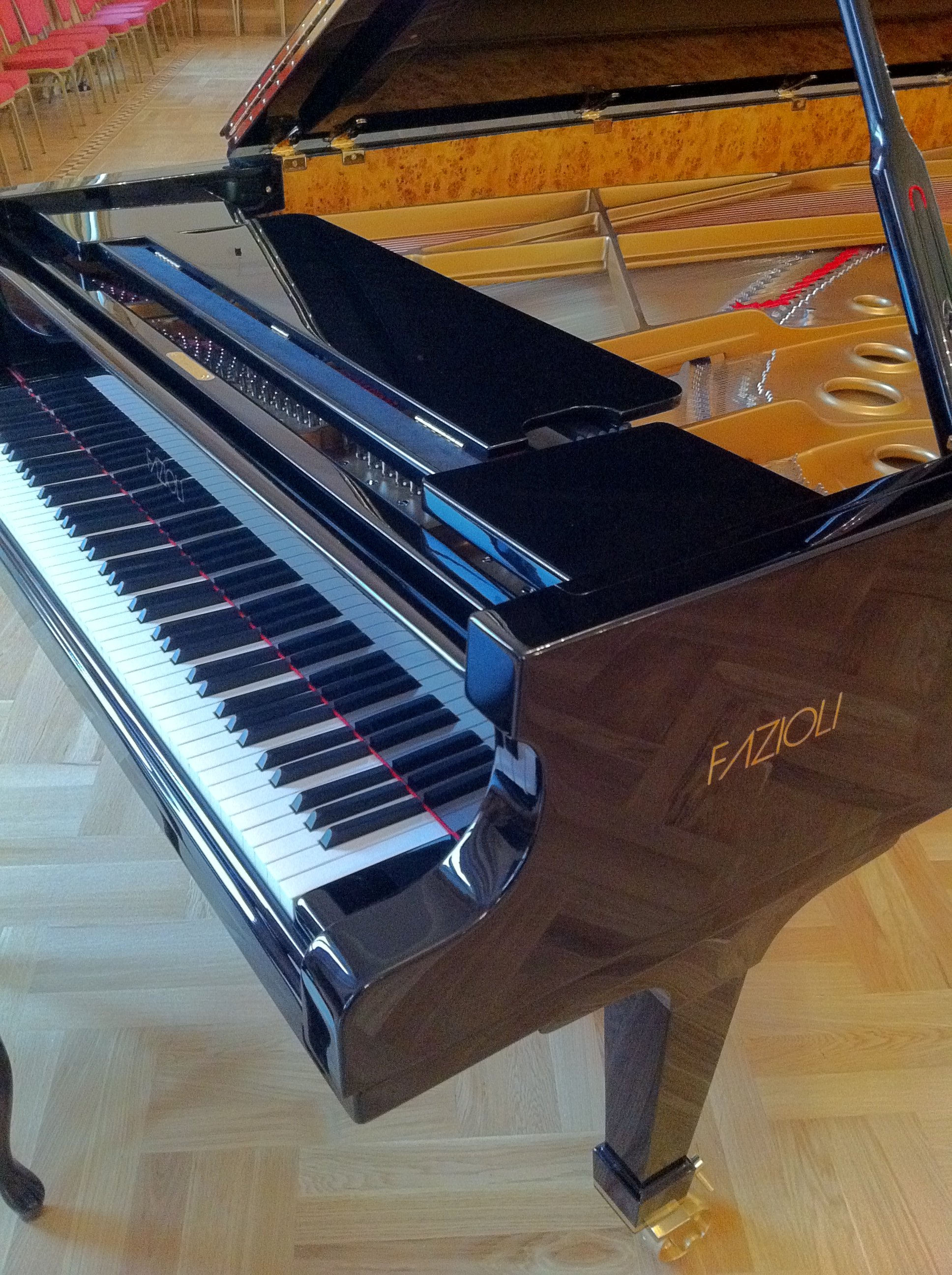 Рояль FAZIOLI в Москве